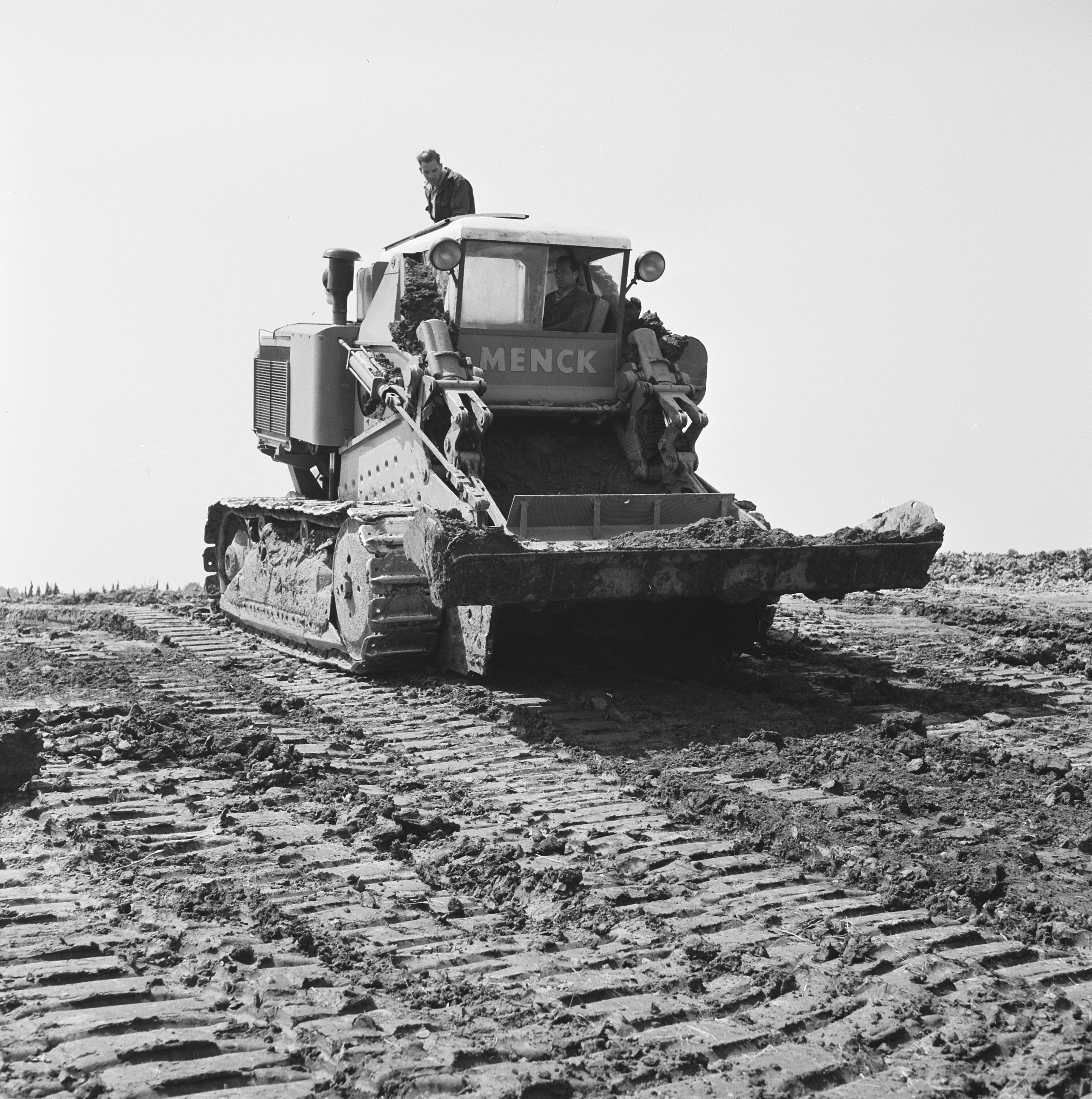 Collectie / Archief : Fotocollectie Nederlandse Heidemaatschappij Reportage / Serie : [ onbekend ] Beschrijving : ontginning, grondbewerking, egaliseren, bezanden, arbeiders, scraper-dozer, 'menck', Ringpolder, Sint Maarten Datum : juli 1958 Locatie : Nederlandse Antillen, Sint Maarten Trefwoorden : arbeiders, bezanden, egaliseren, grondbewerking, ontginning, scraper-dozer Persoonsnaam : 'menck', Ringpolder Fotograaf : [onbekend] Auteursrechthebbende : Nationaal Archief Materiaalsoort : Negatief (zwart/wit) Nummer archiefinventaris : bekijk toegang 2.24.06.02 Bestanddeelnummer : 159-0625